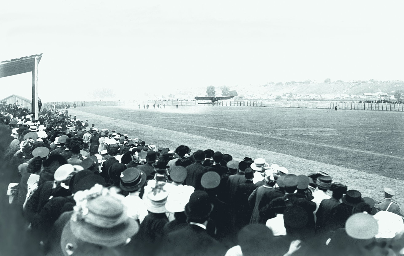 Первое появление самолётов в небе Казани в рамках «авиационной недели» (сентябрь 1910)